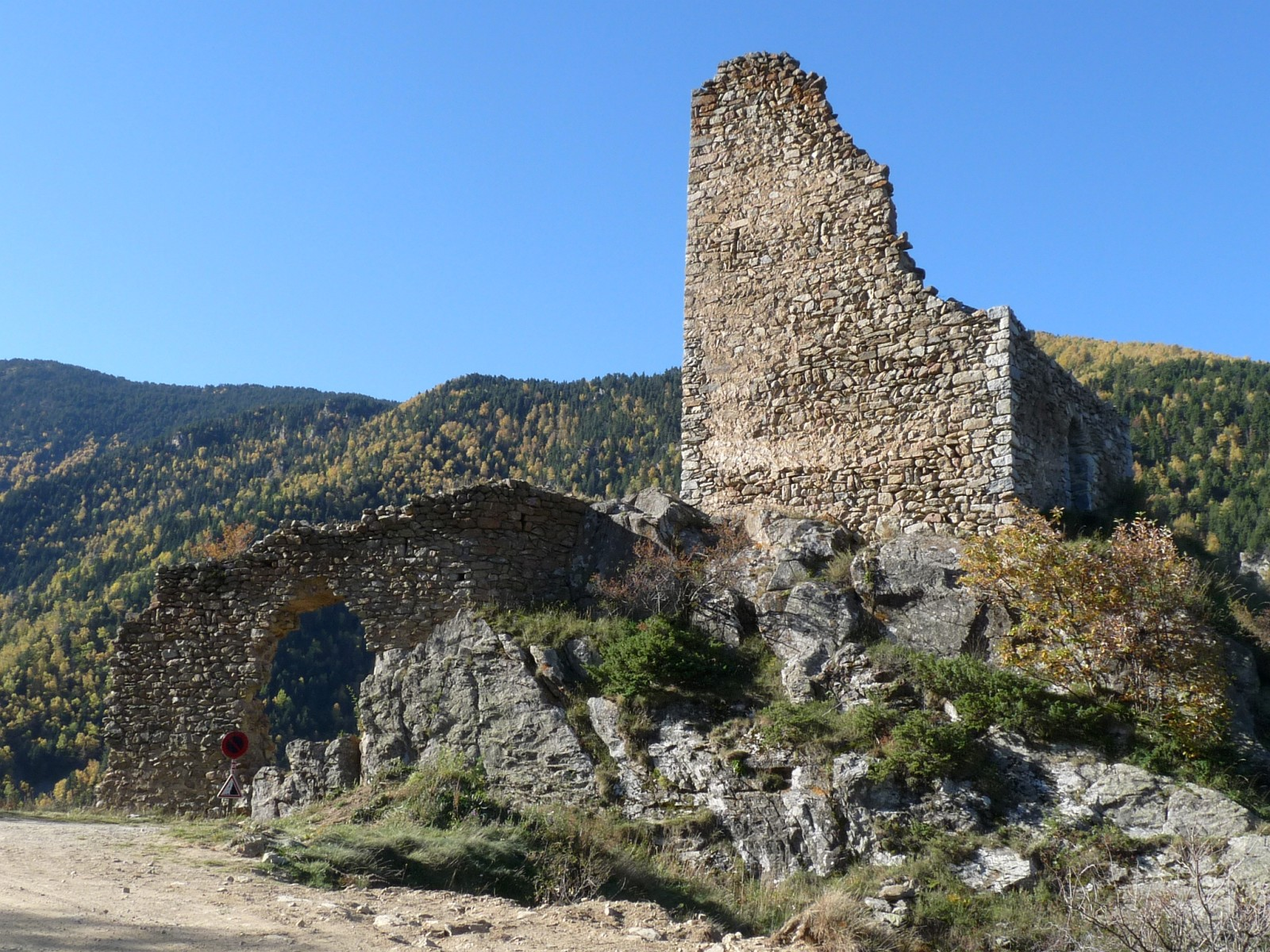 Château de Prats-Balaguer, Pyrénées-Orientales, France